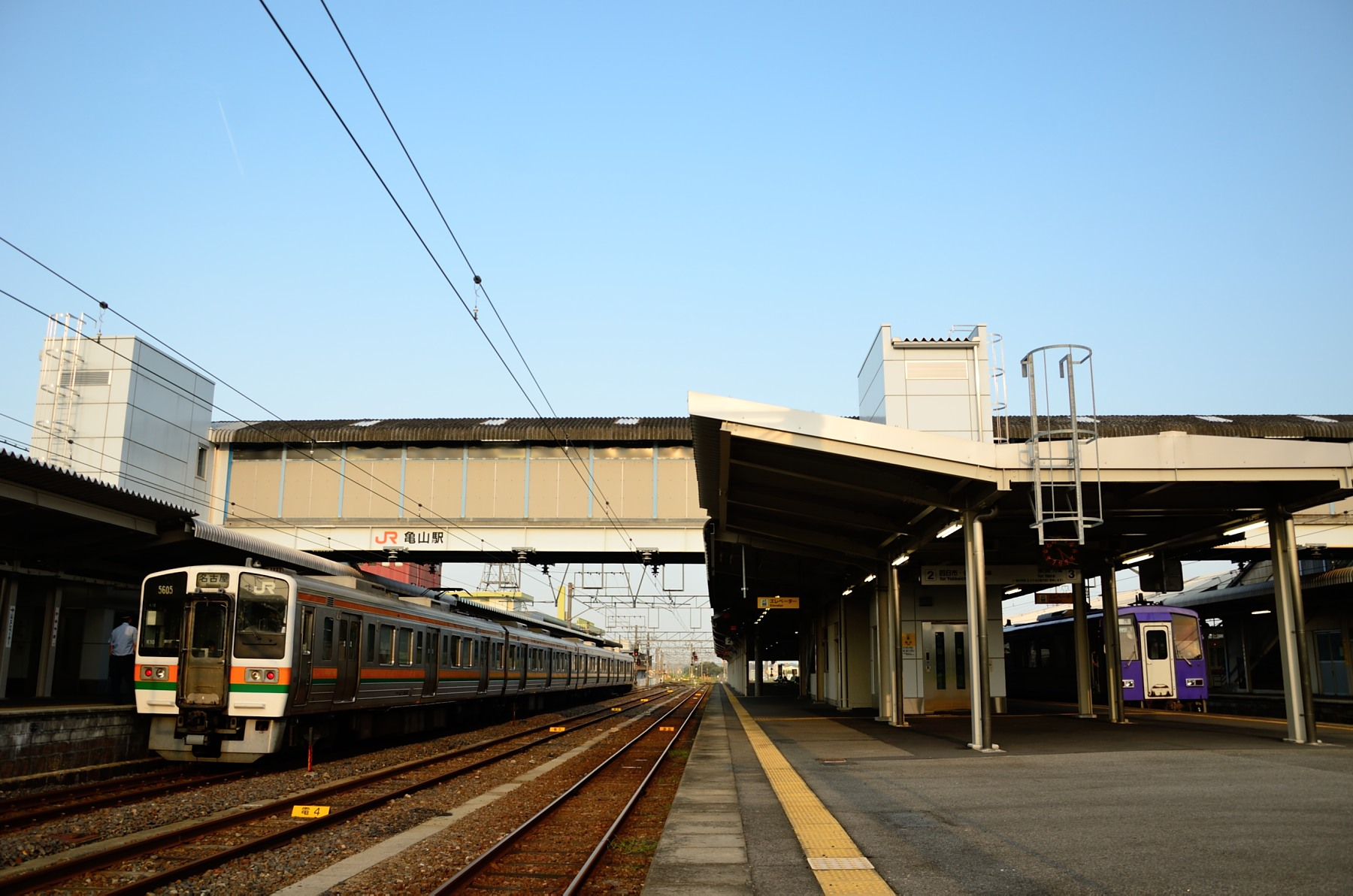 亀山駅構内